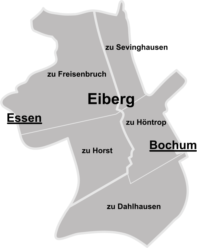 Übersichtskarte der ehemaligen Gemeinde Eiberg in Deutschland bis 1919 (Zusammenschluss der Gemeinden Eiberg, Horst, Freisenbruch und Königssteele zur Großgemeinde Königssteele) und 1926 augeteilt zwischen Linden-Dahlhausen, Steele und Wattenscheid